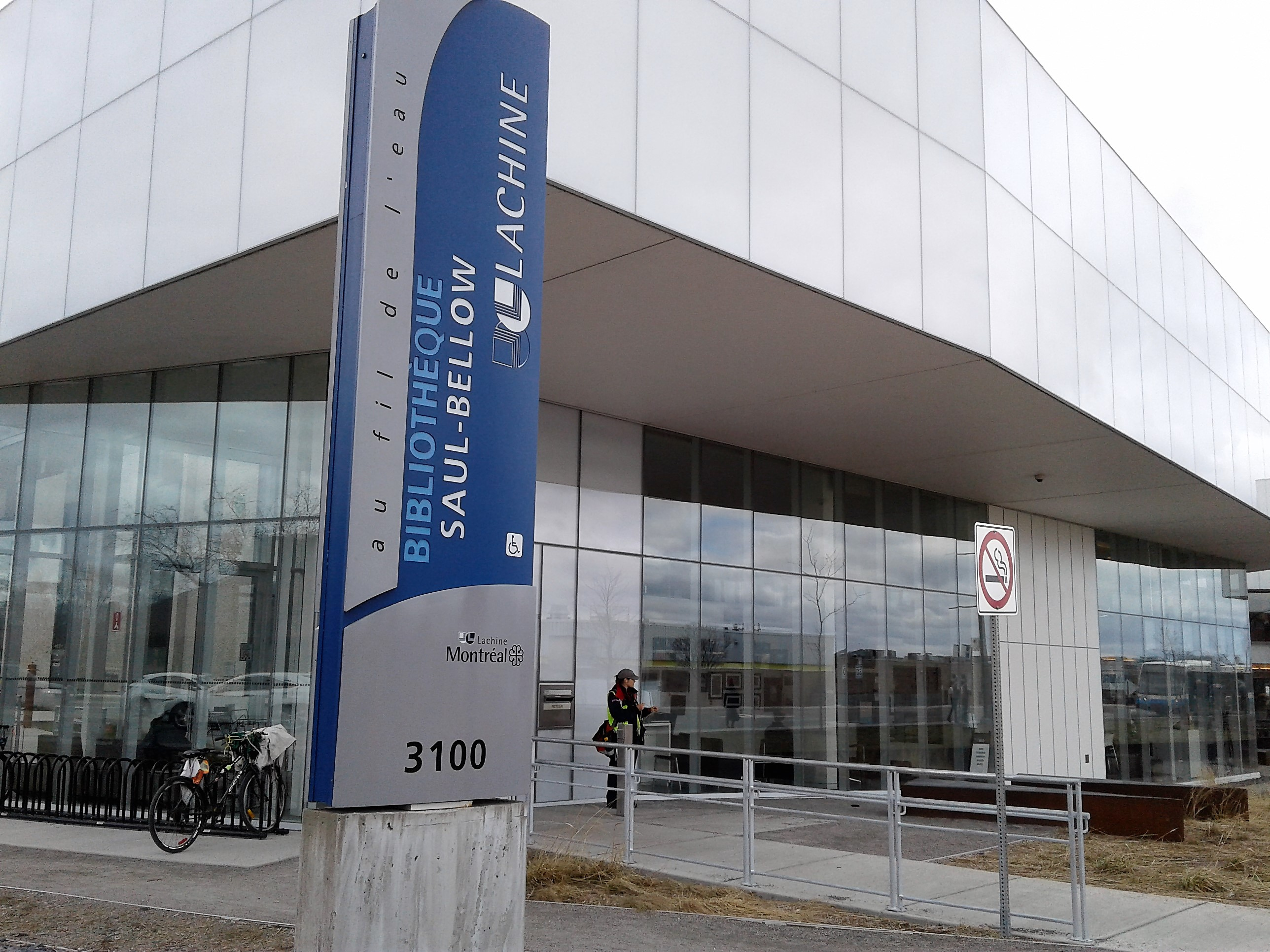 Bibliothèque Saul-Bellow, 3100, rue Saint-Antoine, Lachine, Montréal